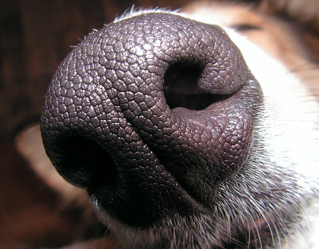 My dog's nose.